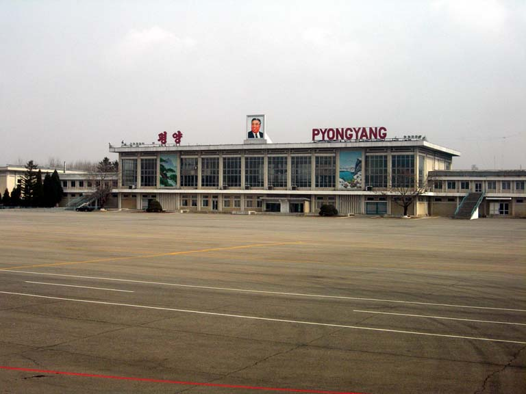 Airport Terminal/Flughafengebäude Pjöngjang/Sunan